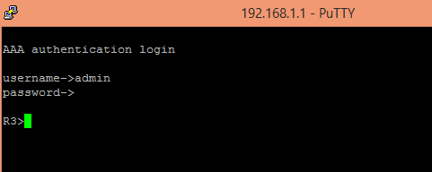 Монгол: Шалгаж үзсэн нь